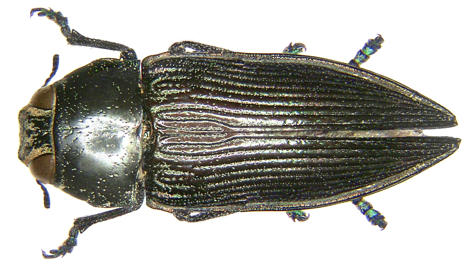 Familie: Buprestidae Grösse: 21 mm Fundort: Namibia, Okaukuejo leg. U.Schmidt, 1994; det. Mühle Foto: U.Schmidt, 2006